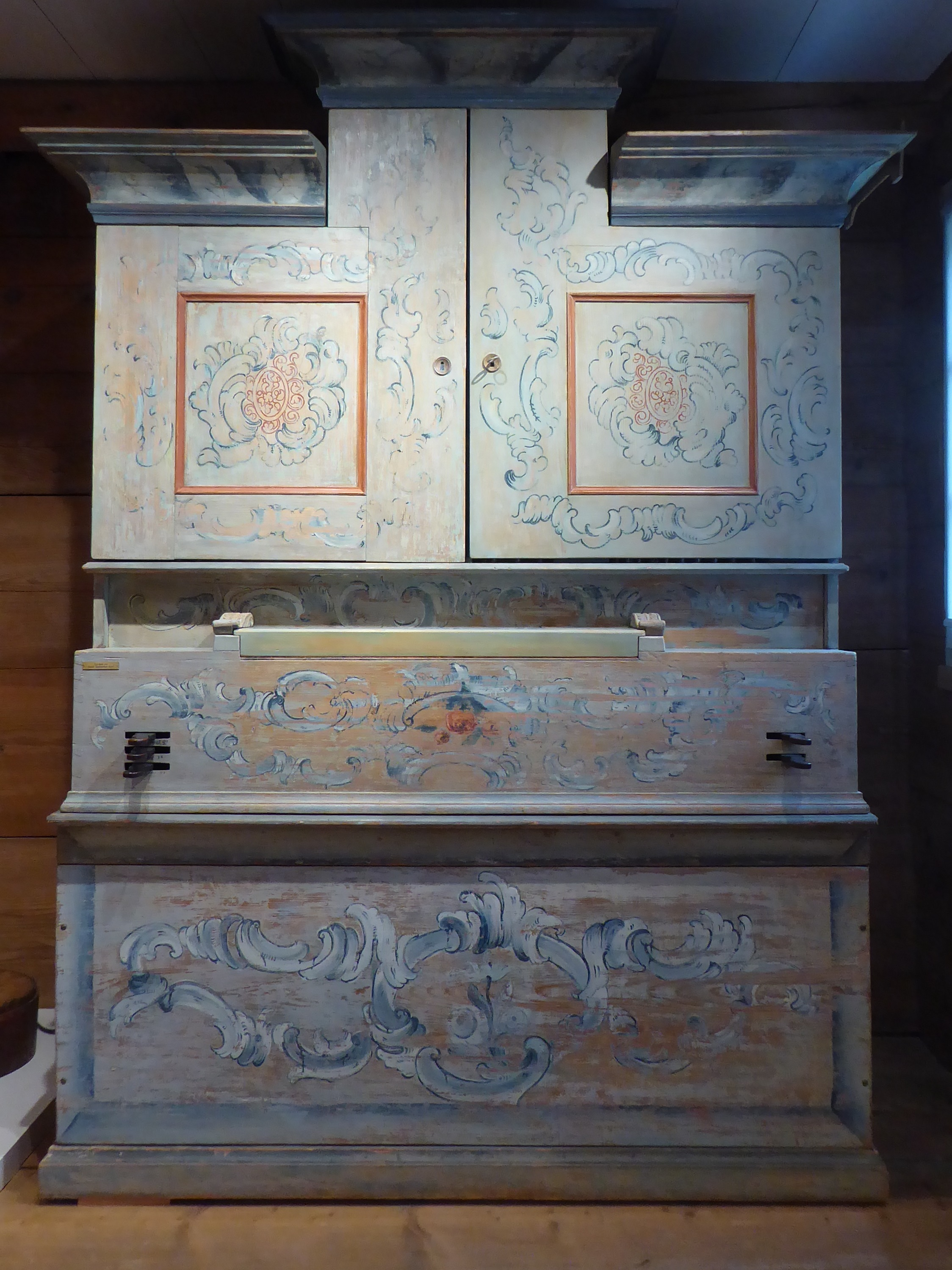 Toggenburger Hausorgel von Wendelin Looser, 1772. Die Fassung wurde teilweise ergänzt und die rechte Flügeltür erneuert. Der Blasbalg wurde durch einen Motor ersetzt.